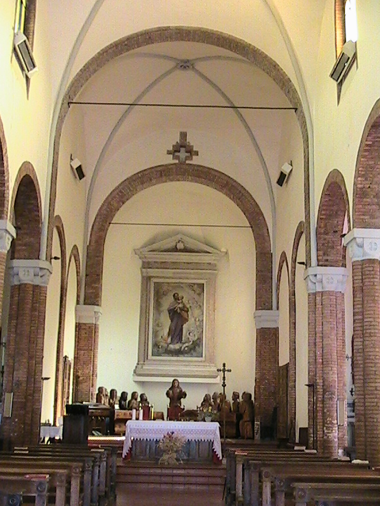 Pellegrino Parmense - chiesa parrocchiale di San Giuseppe - interno